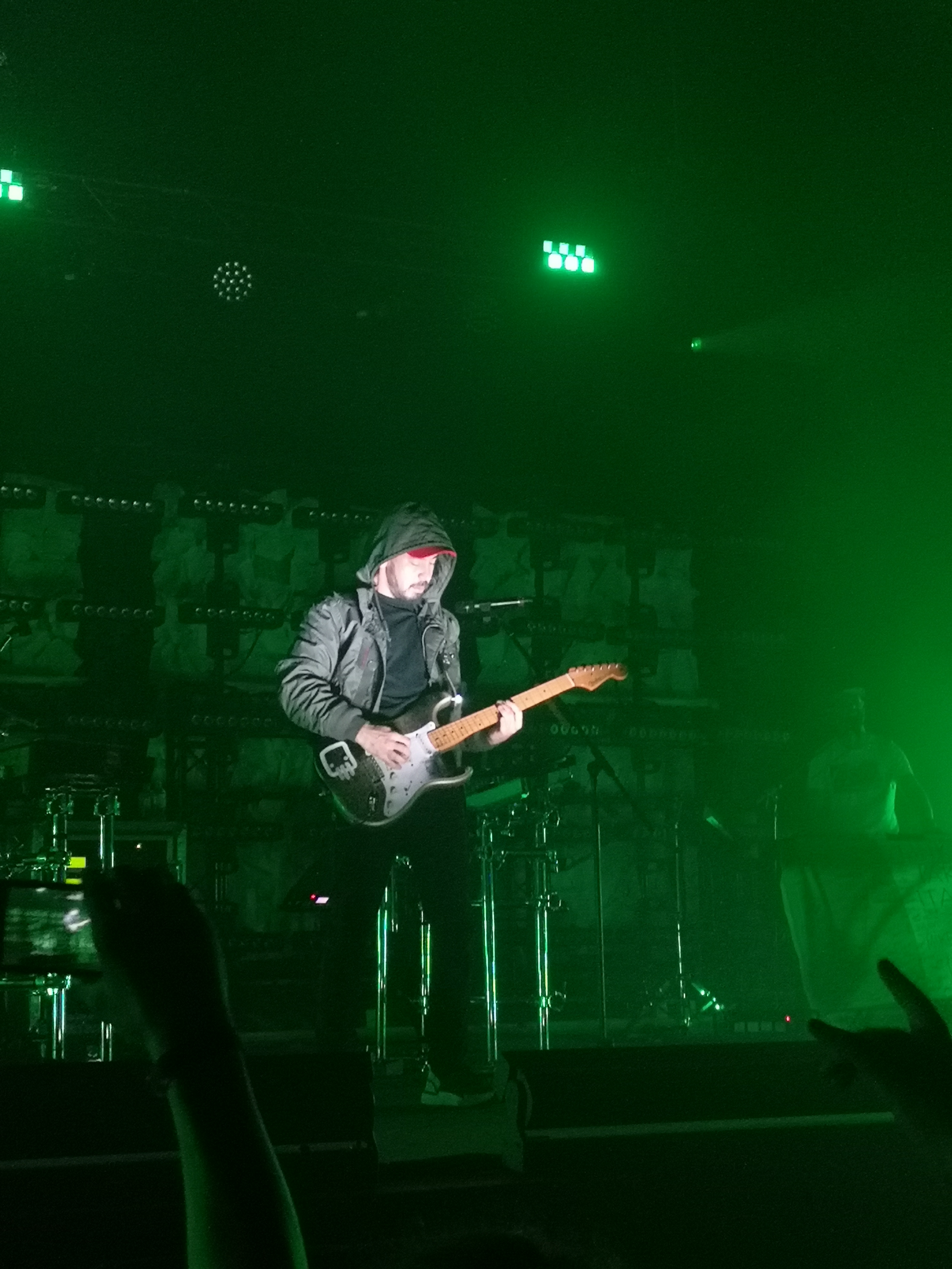 Mike Shinoda in concerto al Gran Teatro Geox di Padova il 15 marzo 2019